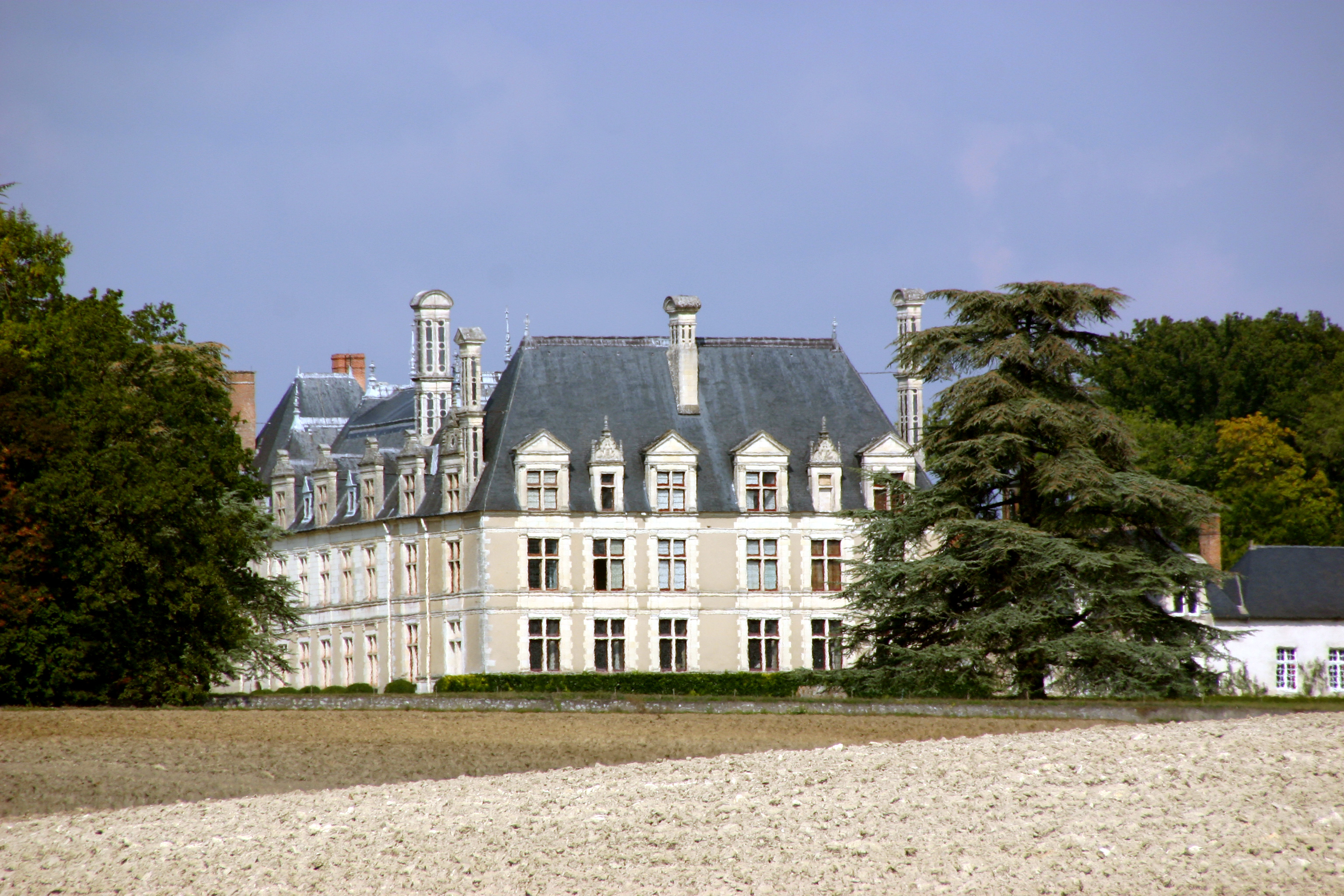 Château de Beauregard